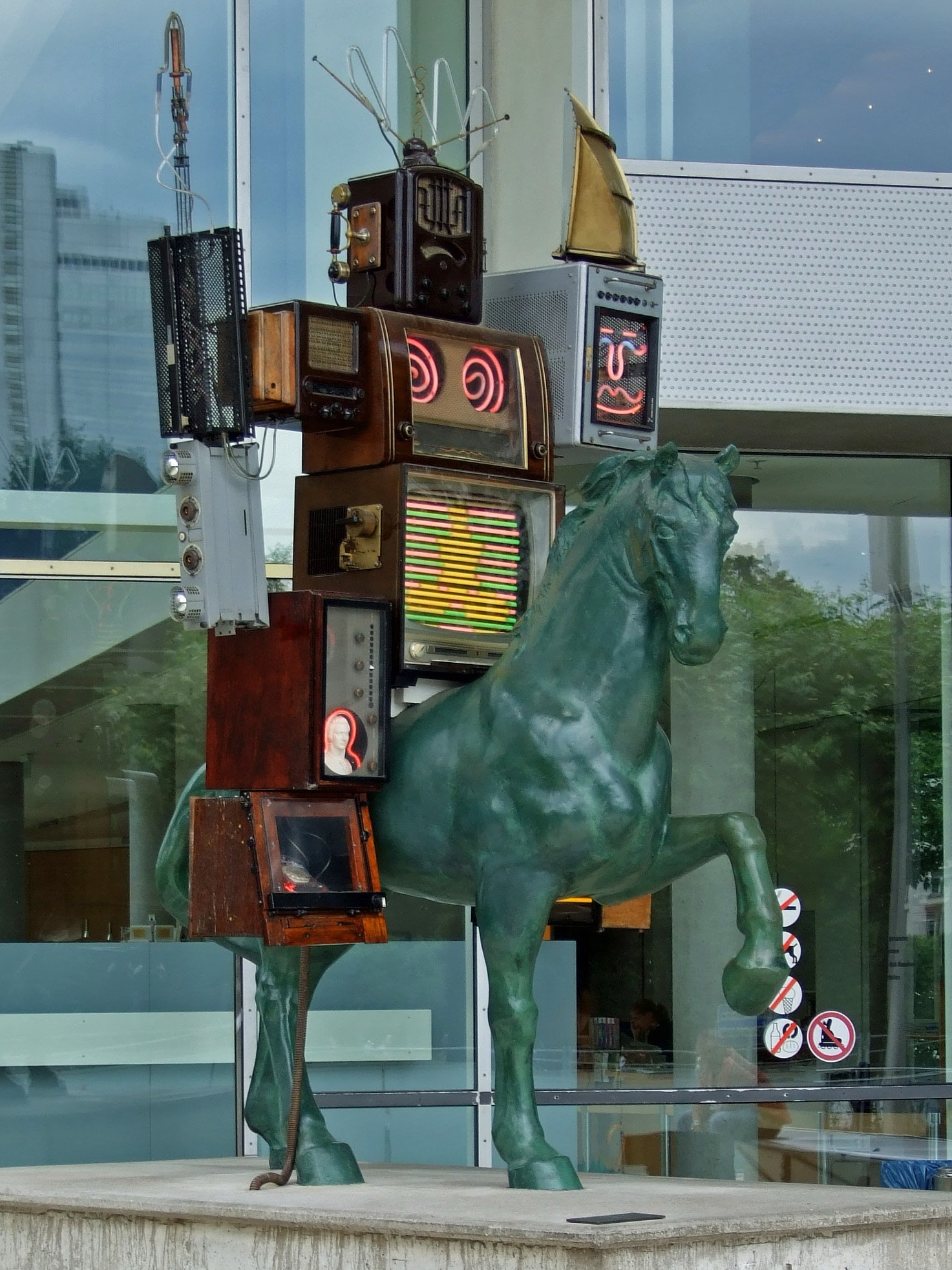 Nam June Paiks Skulptur Pre-Bell-Man vor dem Museum für Kommunikation in Frankfurt am Main